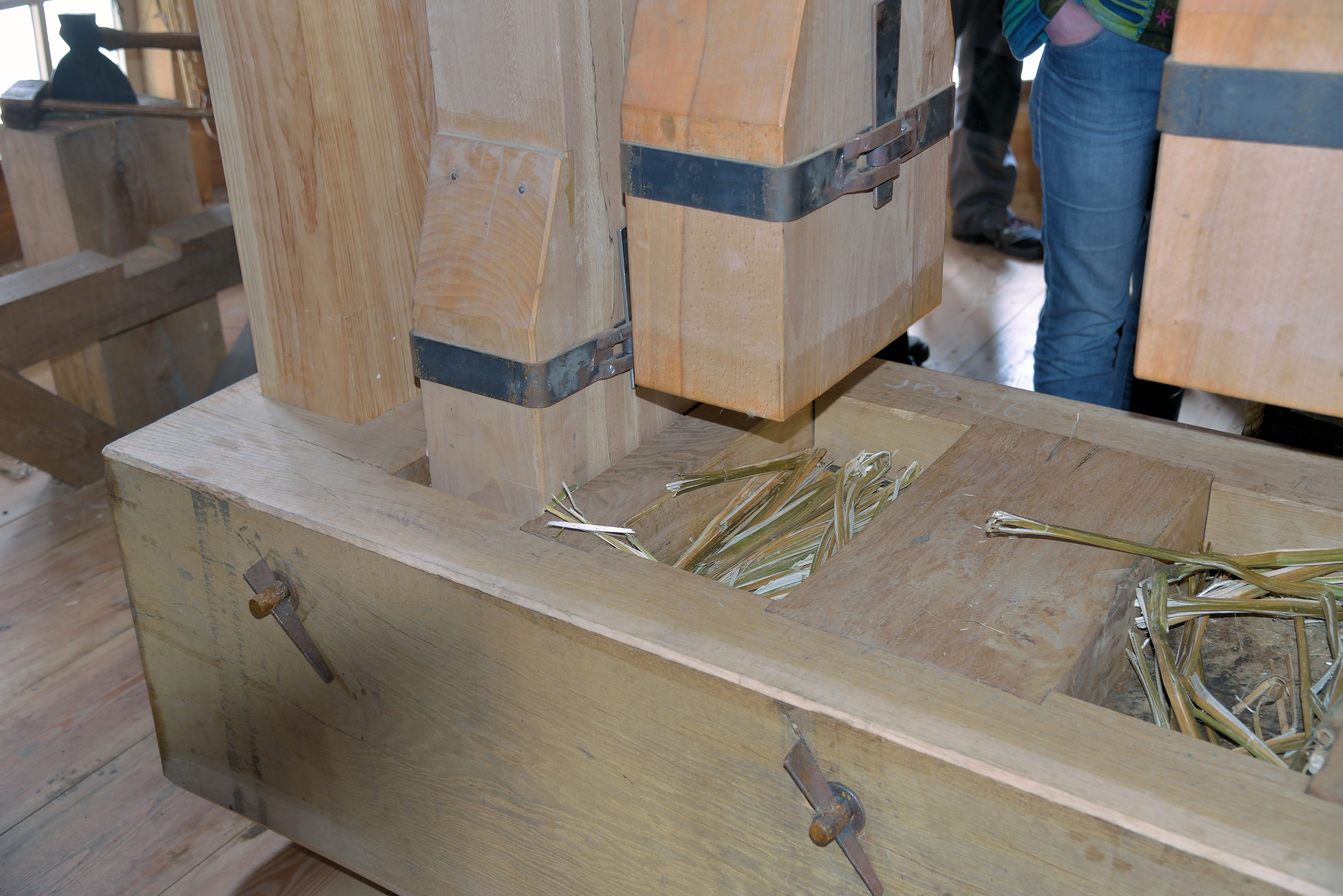 De Paauw, Nauerna